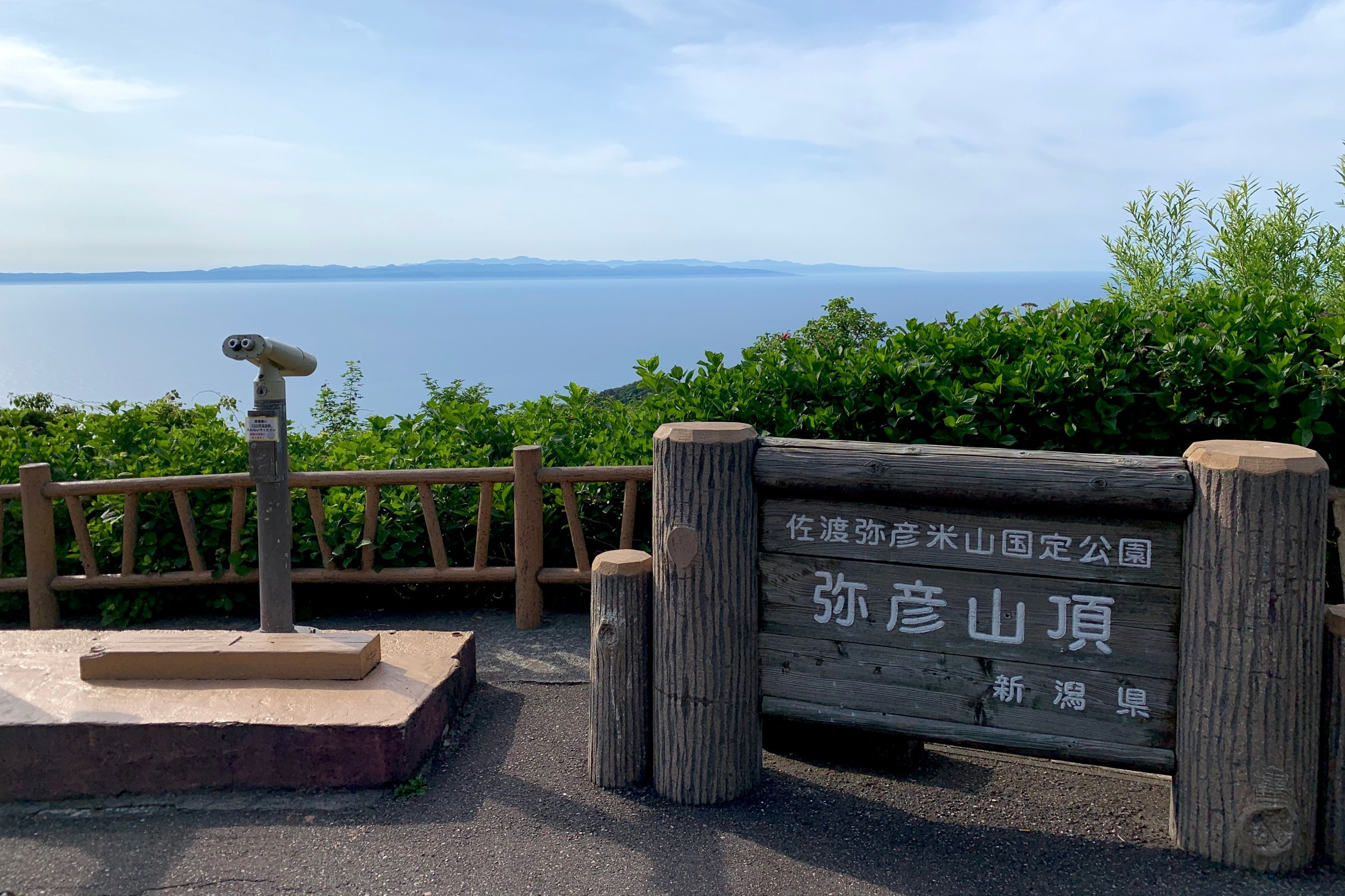 弥彦山山頂駐車場付近から佐渡島を望む（2020年6月）山頂の看板が随所にあるがここは9合目である。